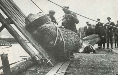 Statue décapitée d'Alexandre III à Moscou au moment de sa destruction